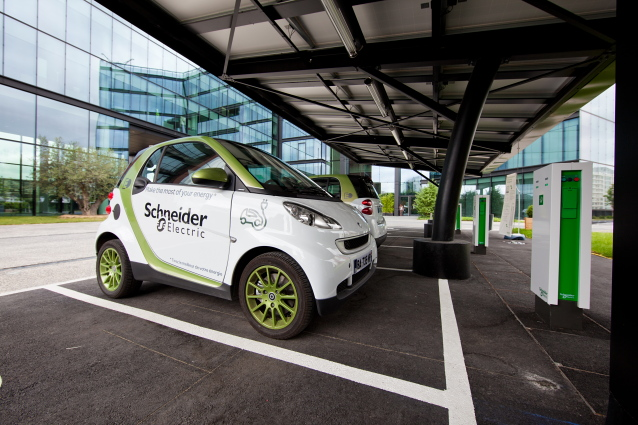 Зарядки Schneider Electric для электромобилей.